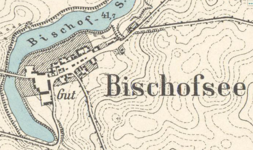 Bischofsee/Stare Biskupice, Słubice, Polen, Ausschnitt aus dem Messtischblatt 1984 (alte Nr.) Drenzig von 1896